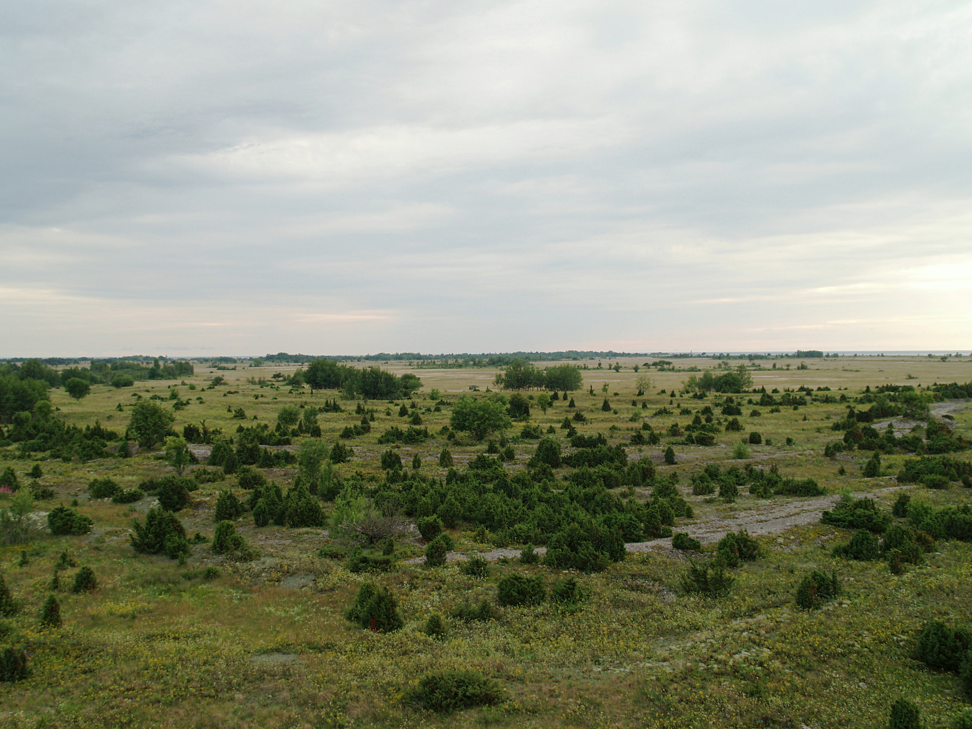 Suur-Pakri maastik